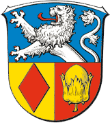 Wappen von Aßlar